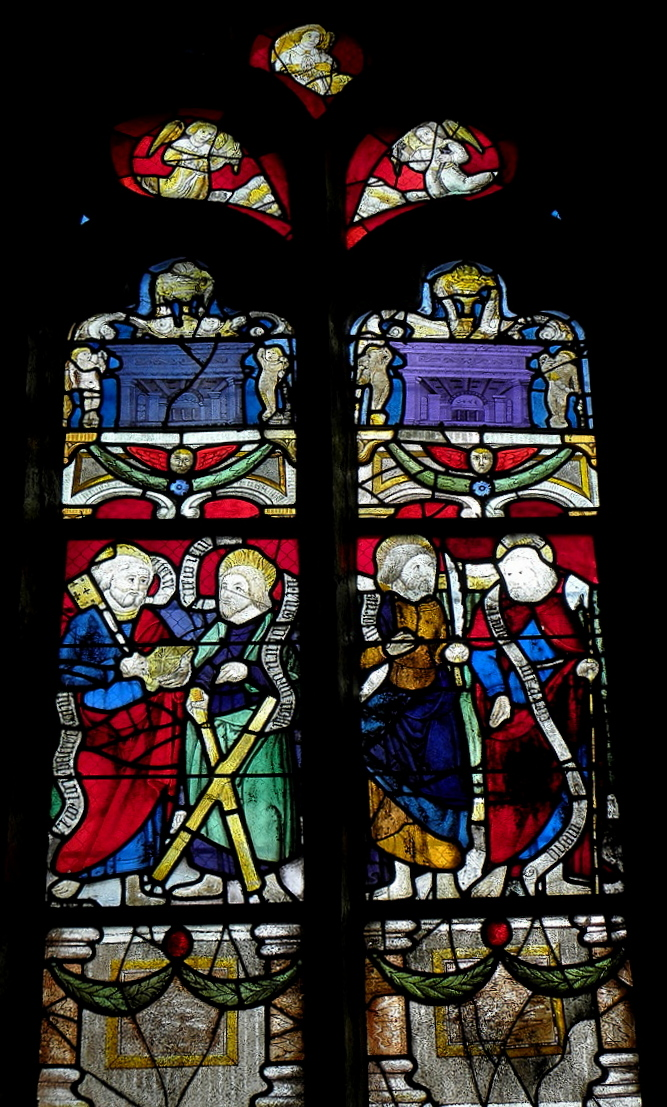 Baie 06 de l'église Saint-Laurent de Maël-Pestivien (22).